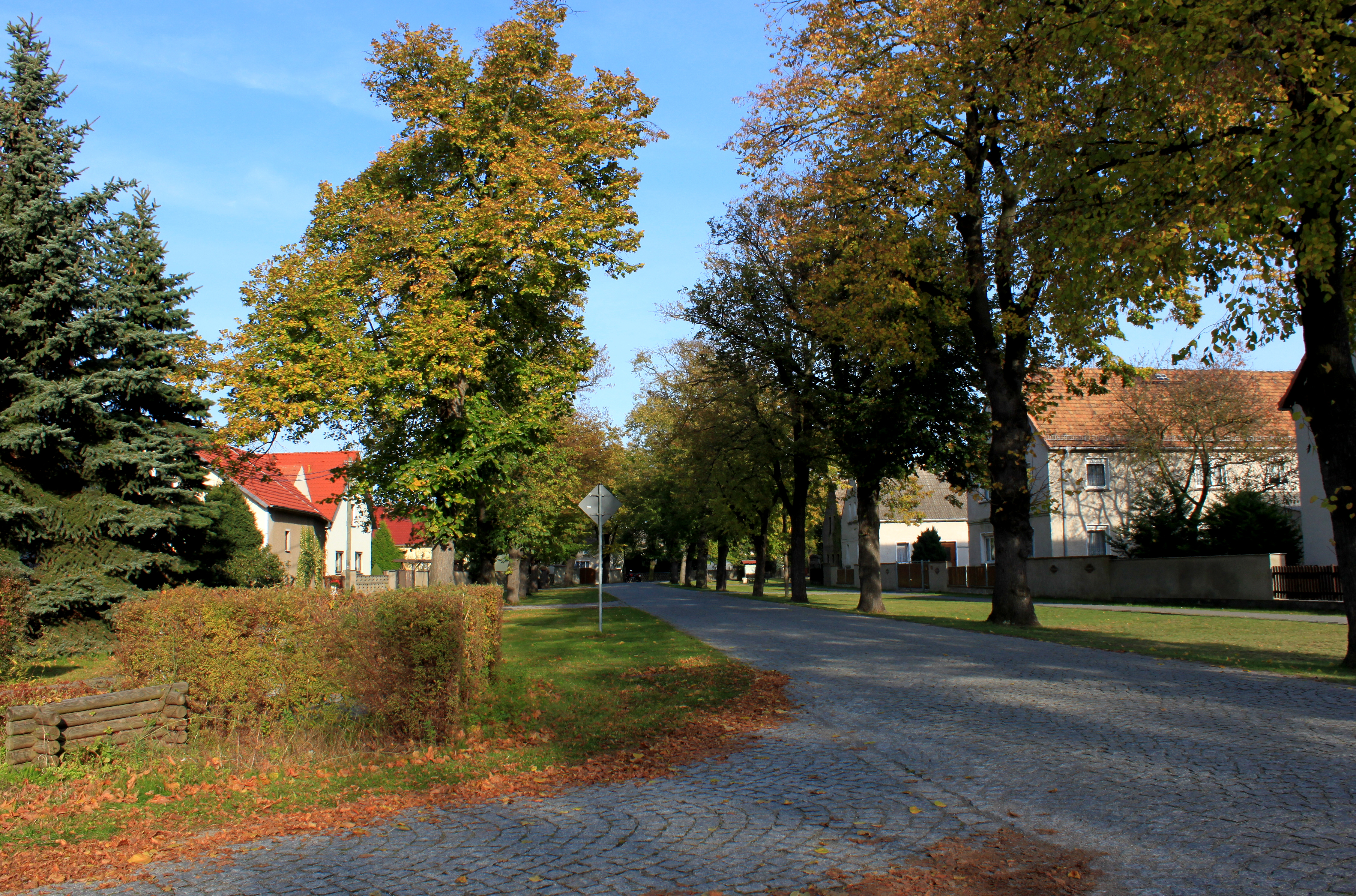 Kosilenzien